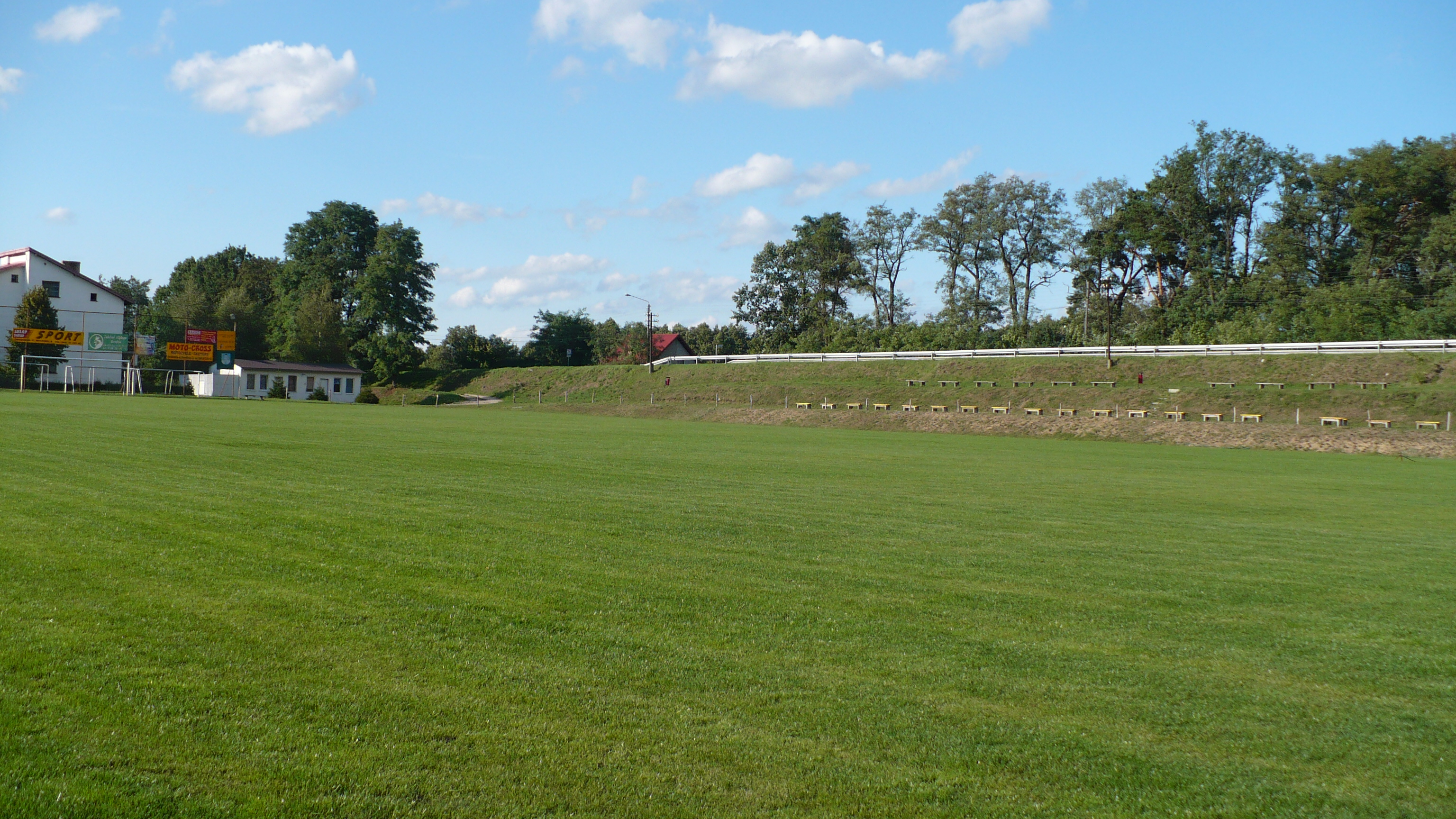 Stadion Gminny Lubrza